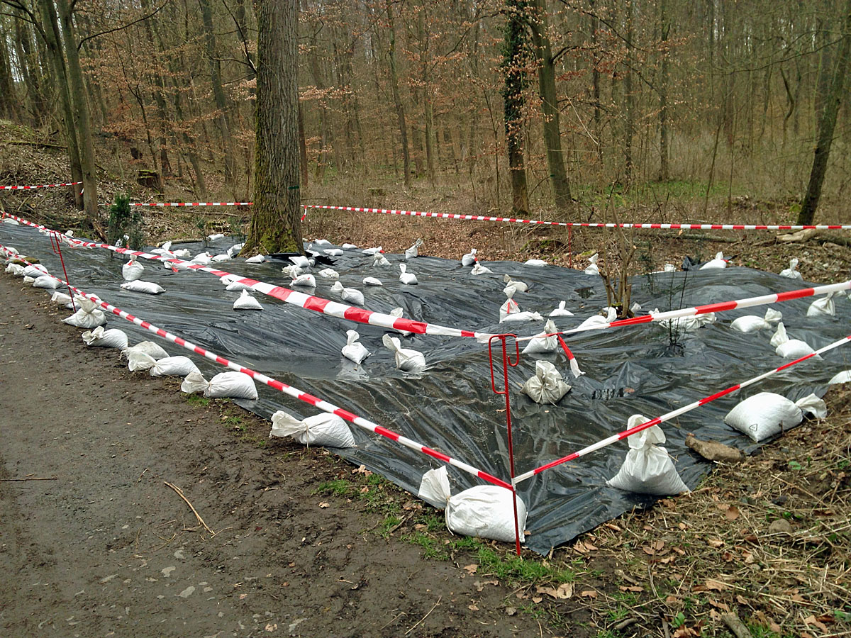 Versuch der Bekämpfung des Japanischen Staudenknöterichs im Stadtwald von Bad Vilbel (Wetterau) im März 2013.